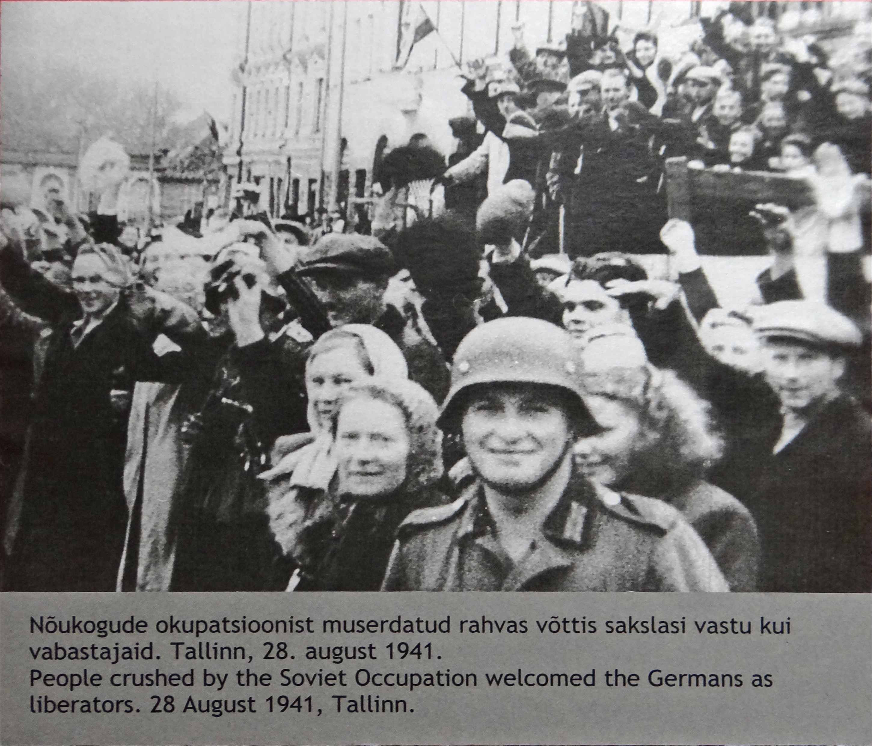 Photographie exposée par le musée de la ville de Tallinn dans les salles consacrées à l'histoire récente Le musée de la ville de Tallinn présente le passé et les grandes étapes du développement de la ville jusqu'à l’indépendance en 1991. En 1710, le territoire estonien devient une région de l'Empire russe. En 1920, à l'issue de la Première Guerre mondiale, qui a déclenché l'effondrement de l'Empire russe, l'Estonie acquiert, comme ses voisins baltes, son indépendance. En 1940, l'Union soviétique occupe l'Estonie (accord secret figurant dans le Pacte germano-soviétique de 1939) En 1941, l'Allemagne nazie envahit l'Estonie, à l'issue de sa déclaration de guerre à l'Union soviétique. En 1944, le pays est reconquis par l'Armée rouge et transformé en une République Socialiste intégrée à l'URSS. Une forte minorité russe s'installe pour fournir des bras aux nouvelles activités industrielles et militaires. L'éclatement de l'Union soviétique en 1991 permet à l'Estonie de retrouver son indépendance à l'issue d'un processus pacifique. Extrait de l'article de Wikipedia sur l'Estonie _______________ Les pays baltes qui représentaient, pour le tsar Pierre le Grand, la "fenêtre sur l'Europe" ont été très convoités au cours des siècles. Polonais, russes, allemands, scandinaves y ont laissé des traces importantes à l'issue des guerres et des occupations de ces territoires. Les villes maritimes de ces pays sont fortement marquées par la ligue de la Hanse qui prit naissance en 1241, elles commerçaient avec les villes anglaises, russes, polonaises et scandinaves. Musée de la ville de Tallinn linnamuuseum.ee/linnamuuseum/en/